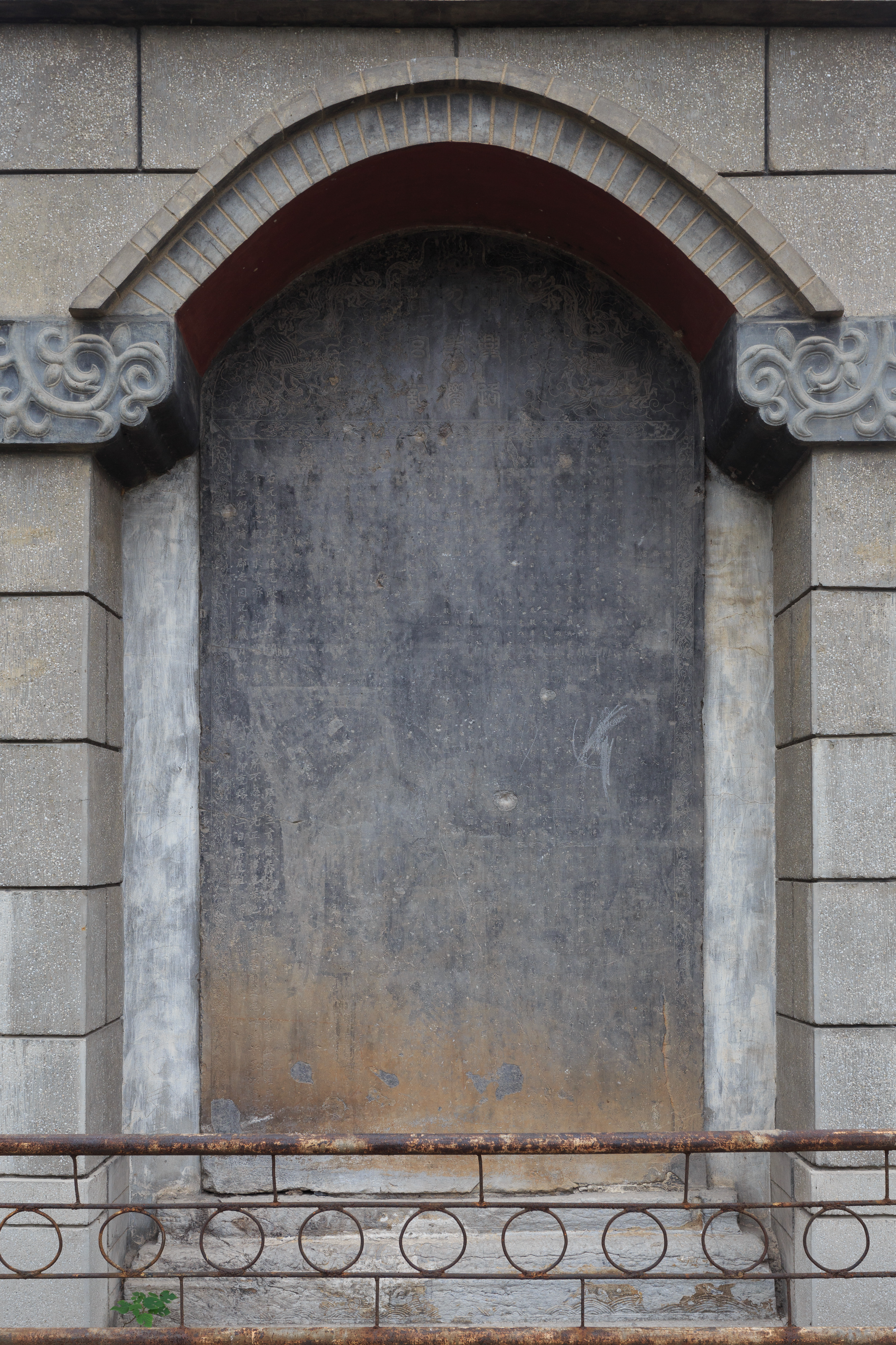 荆州玄妙观—— 元至正三年（1343年）《中興路剏建九老僊都宮記》